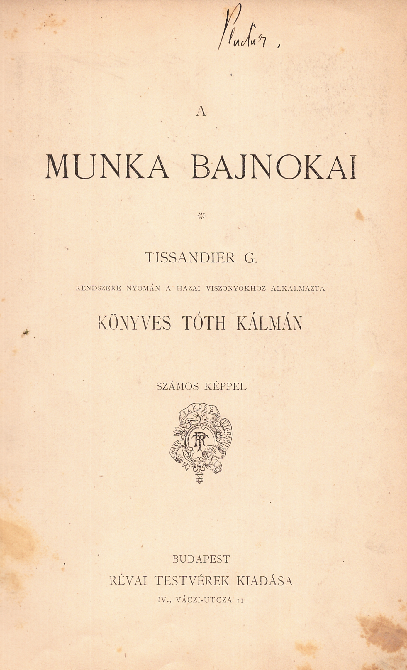 Gaston Tissandier (1843-1899): A munka bajnokai (1888), fordította és átdolgozta Könyves Tóth Kálmán (1837-1924)